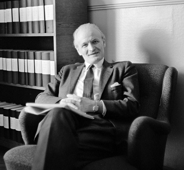 Stadsfullmäktigeordförande Bengt Lind.